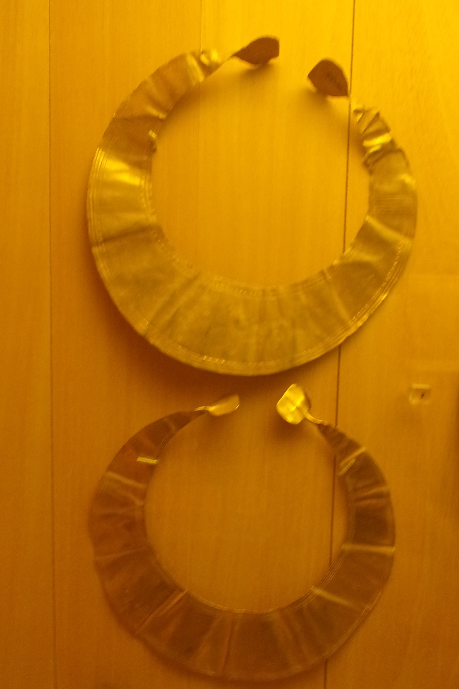 Lunules en or provenant du trésor de Lanrivoa en Bourbriac, datant de l'Âge du bronze (musée d'Archéologie nationale de Saint-Germain-en-Laye).